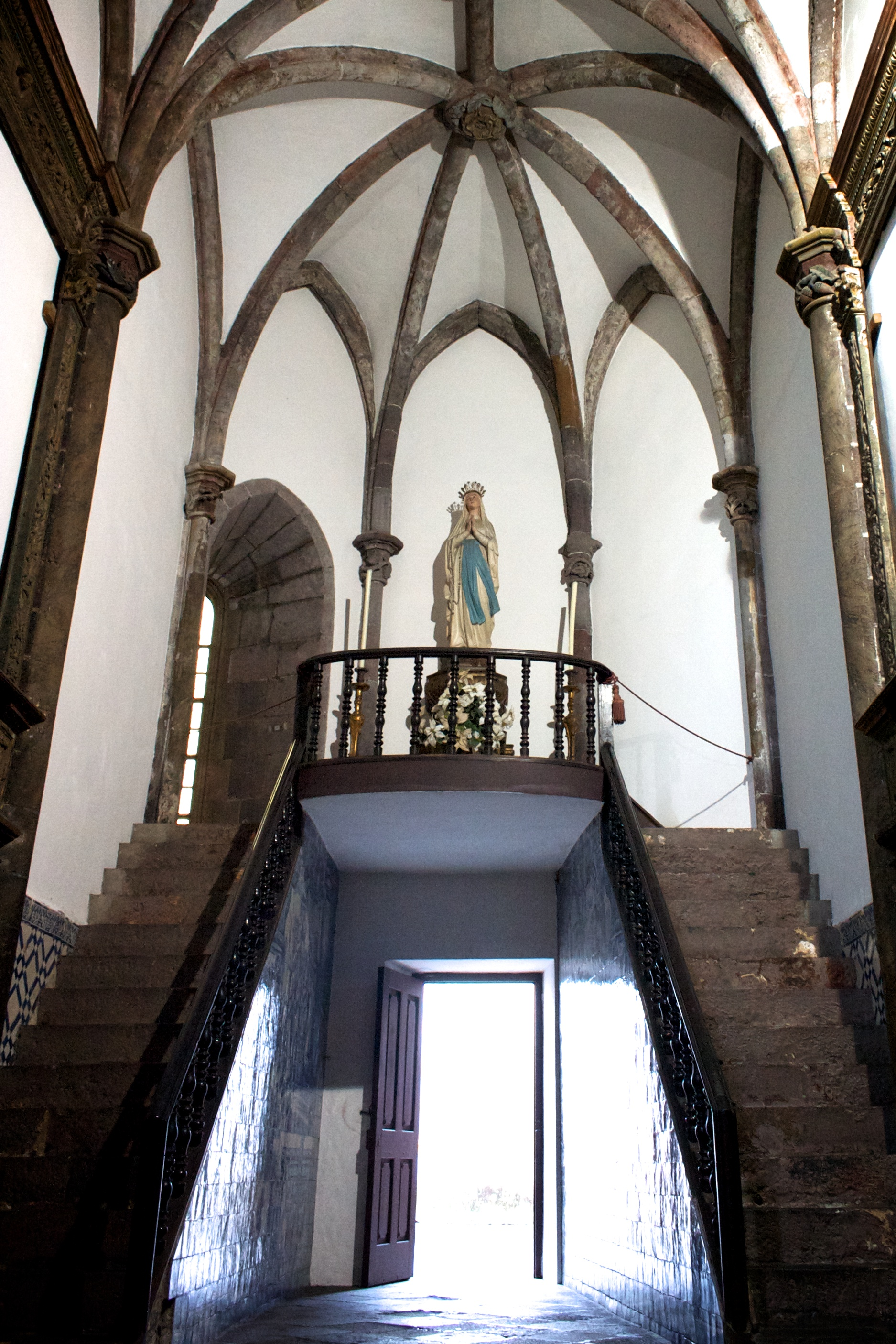 Capela de Nossa Senhora de Lurdes, Sé do Funchal. Antiga capela de Nossa Senhora do Amparo.